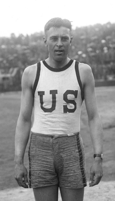 [Robert L.] Simpson, Amérique, 110 m haies [vainqueur aux Jeux interalliés en 15s 1/5] : [photographie de presse] / [Agence Rol]